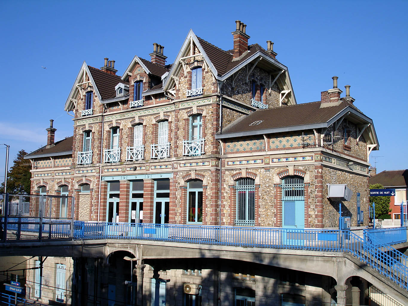 Gare d'Épinay-sur-Seine (Seine-Saint-Denis, France).